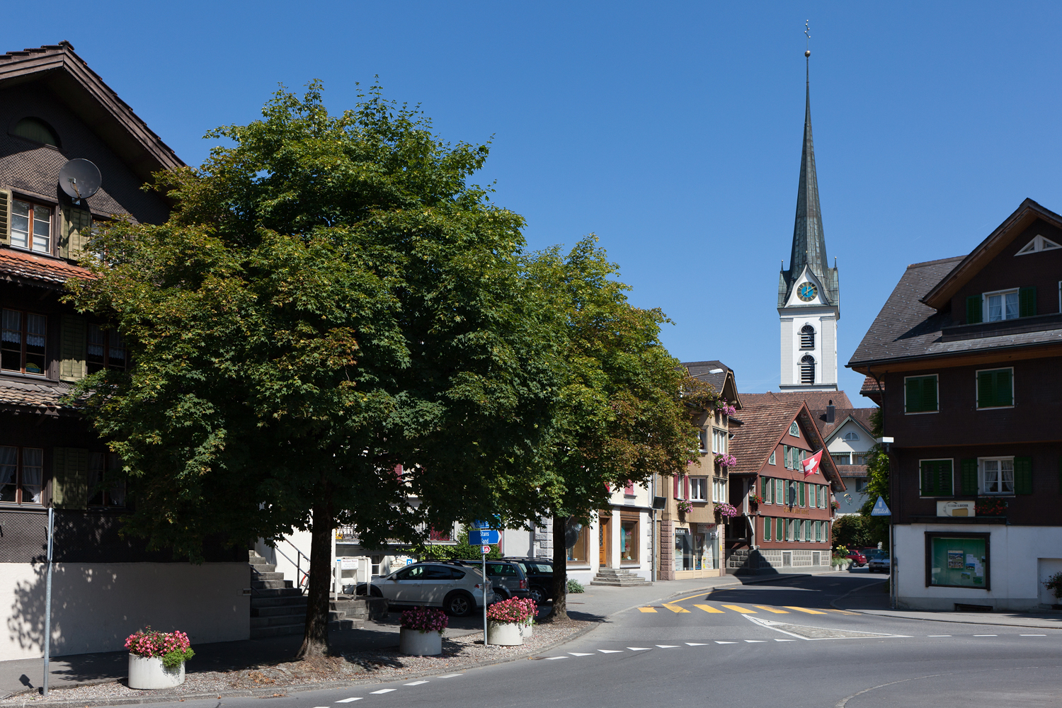 Postplatz und Dorfstrasse mit Pfarrkirche in Kern (OW)